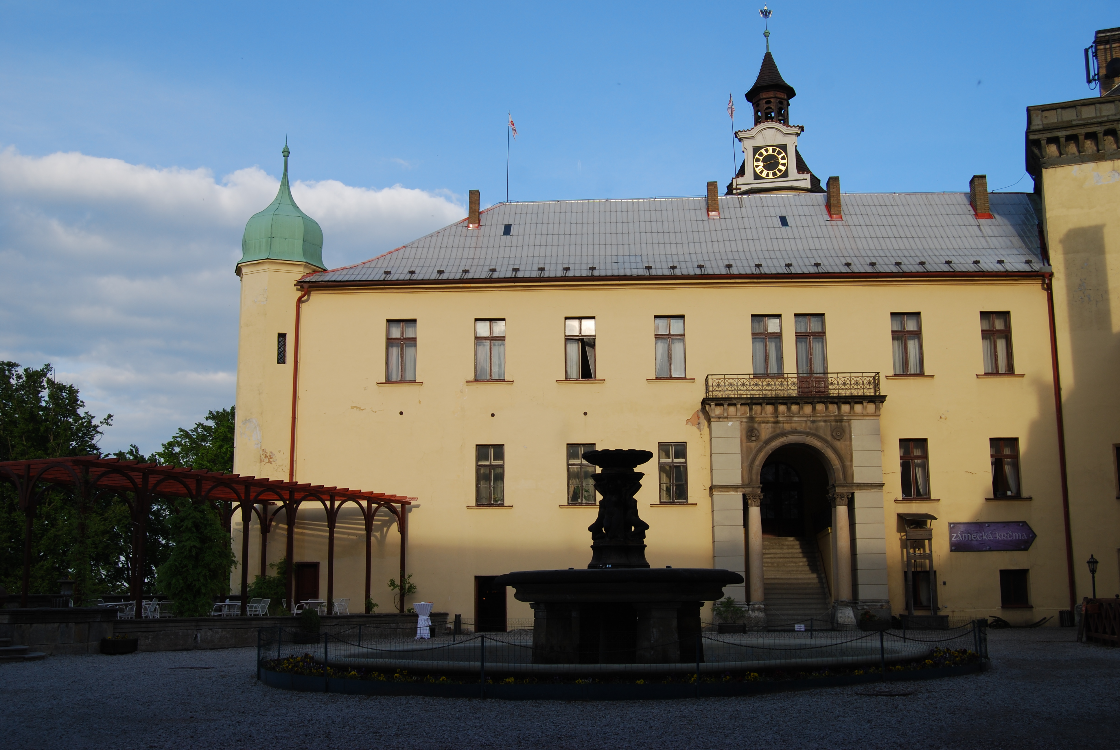 Nádvoří. Zámek Zbiroh v stejnojmenném městě v okrese Rokycany v Plzeňském kraji. Česká republika. - Google Maps - Google Earth